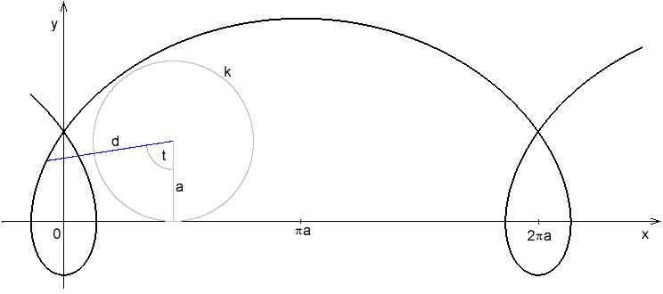 Podloužaná cykloida.